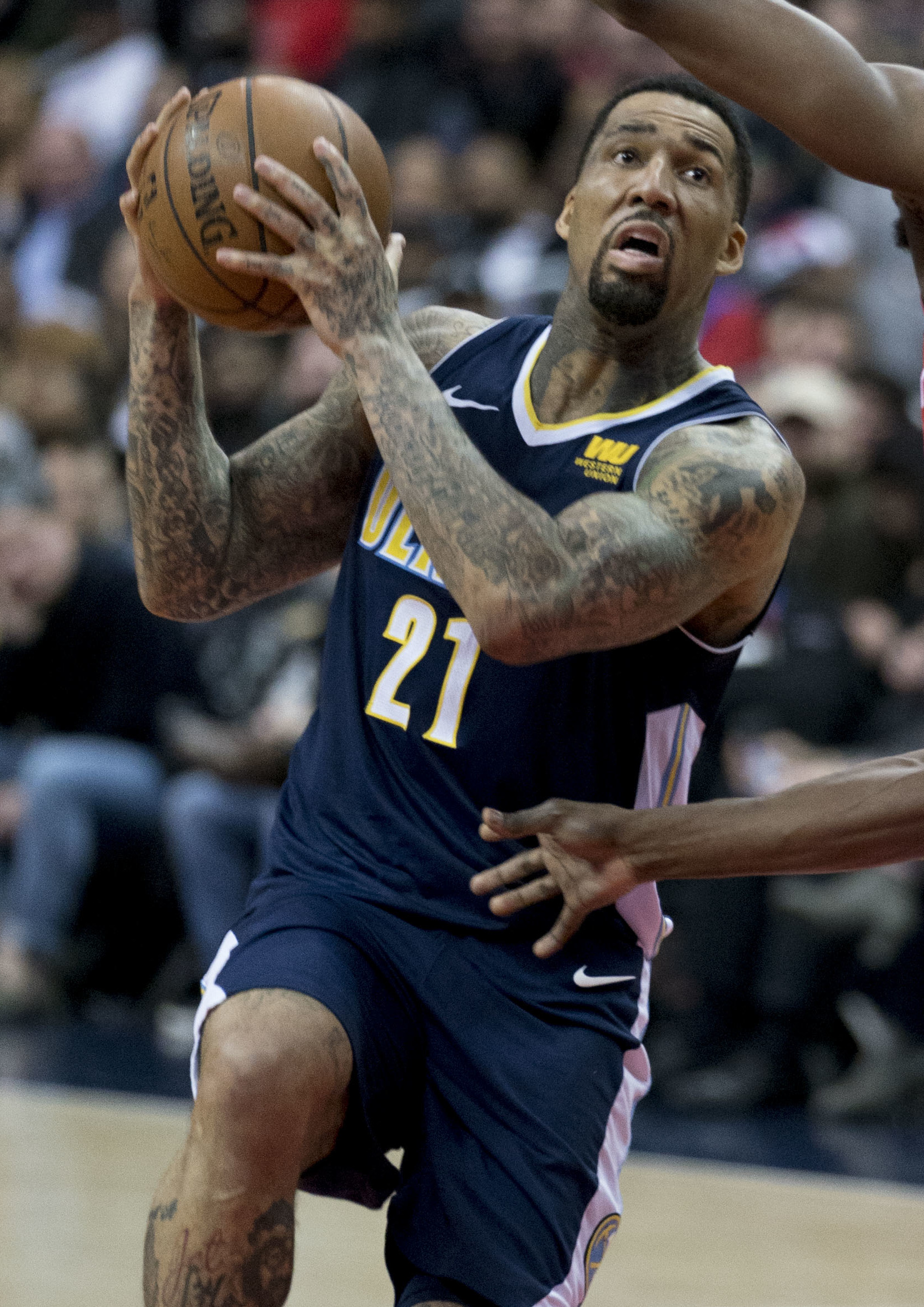 Nuggets at Wizards 3/23/18